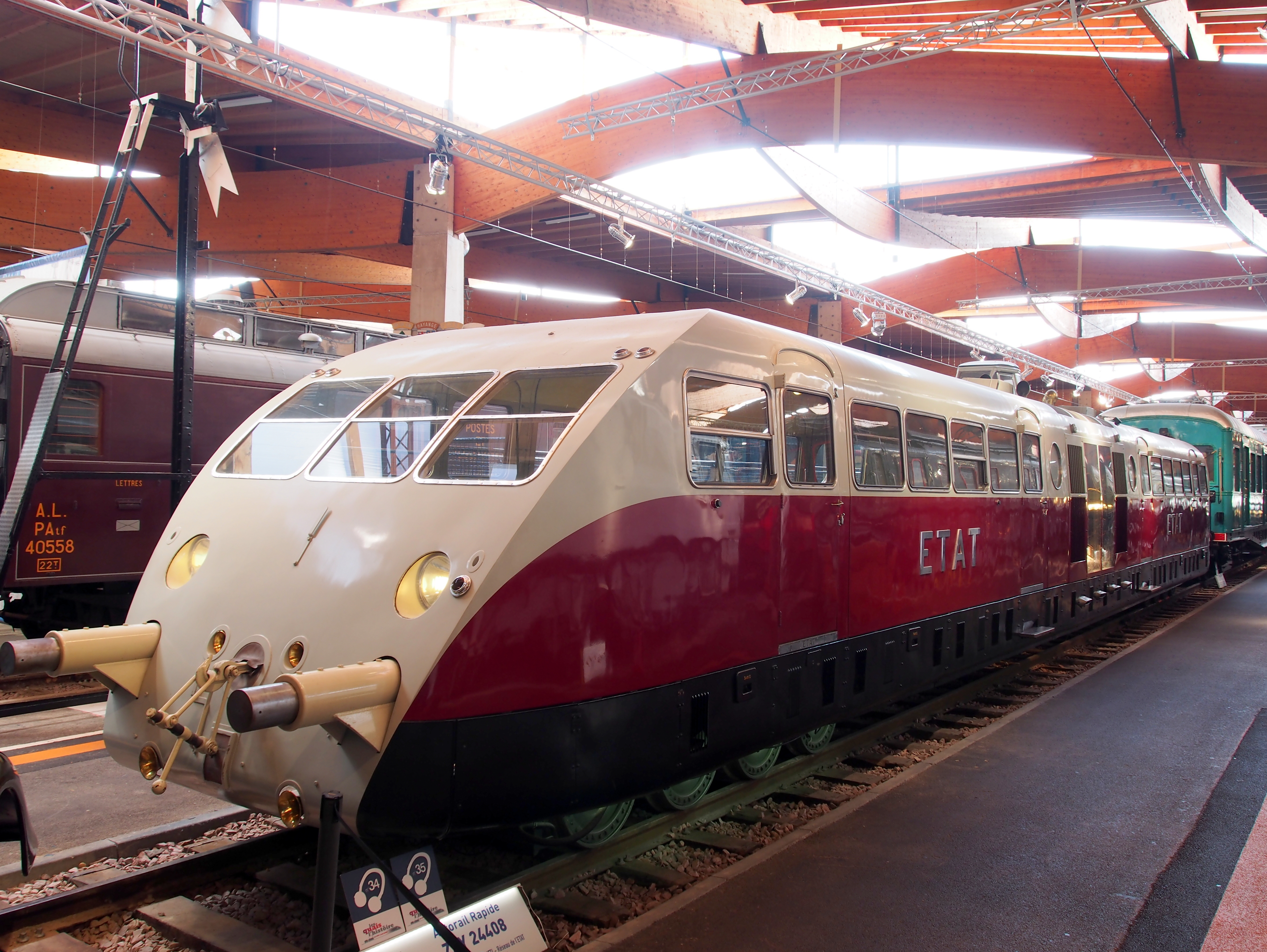 Photographed at Cité du train, Mulhouse, France.